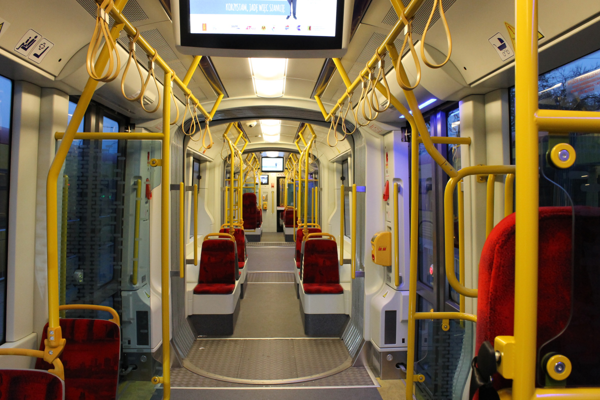 Wnętrze tramwaju Pesa Jazz Duo 128N #3601.